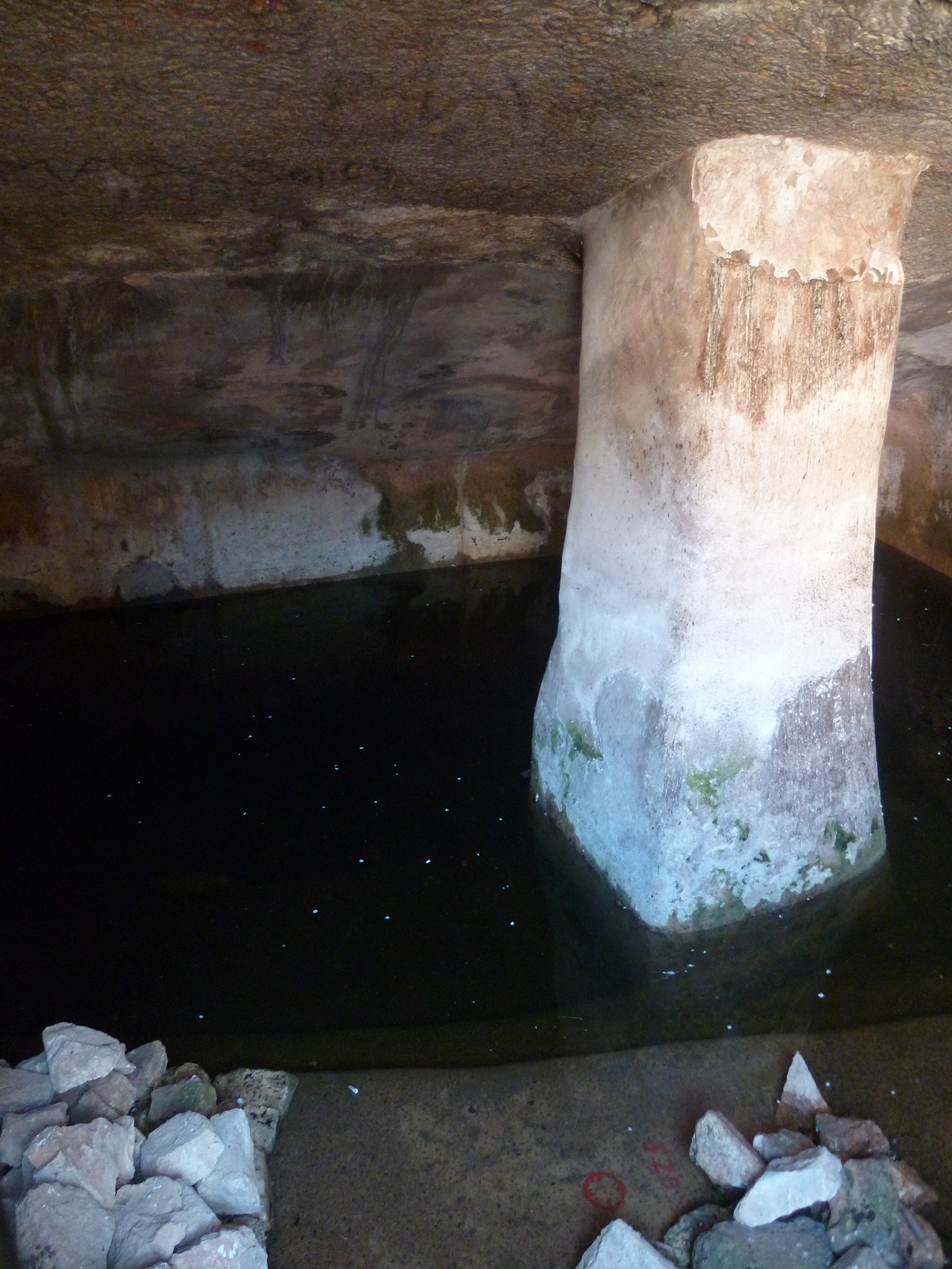 Ces bains rituels sont en partie alimentés par un système de récupération d'eau de pluie.